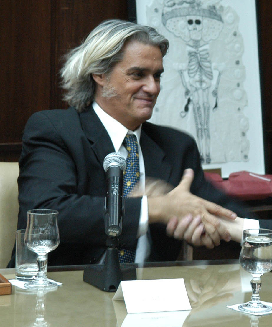 El conductor televisivo Roberto Pettinato en una reunión con el presidente Néstor Kirchner, Buenos Aires, Argentina, 22 de Diciembre de 2005.